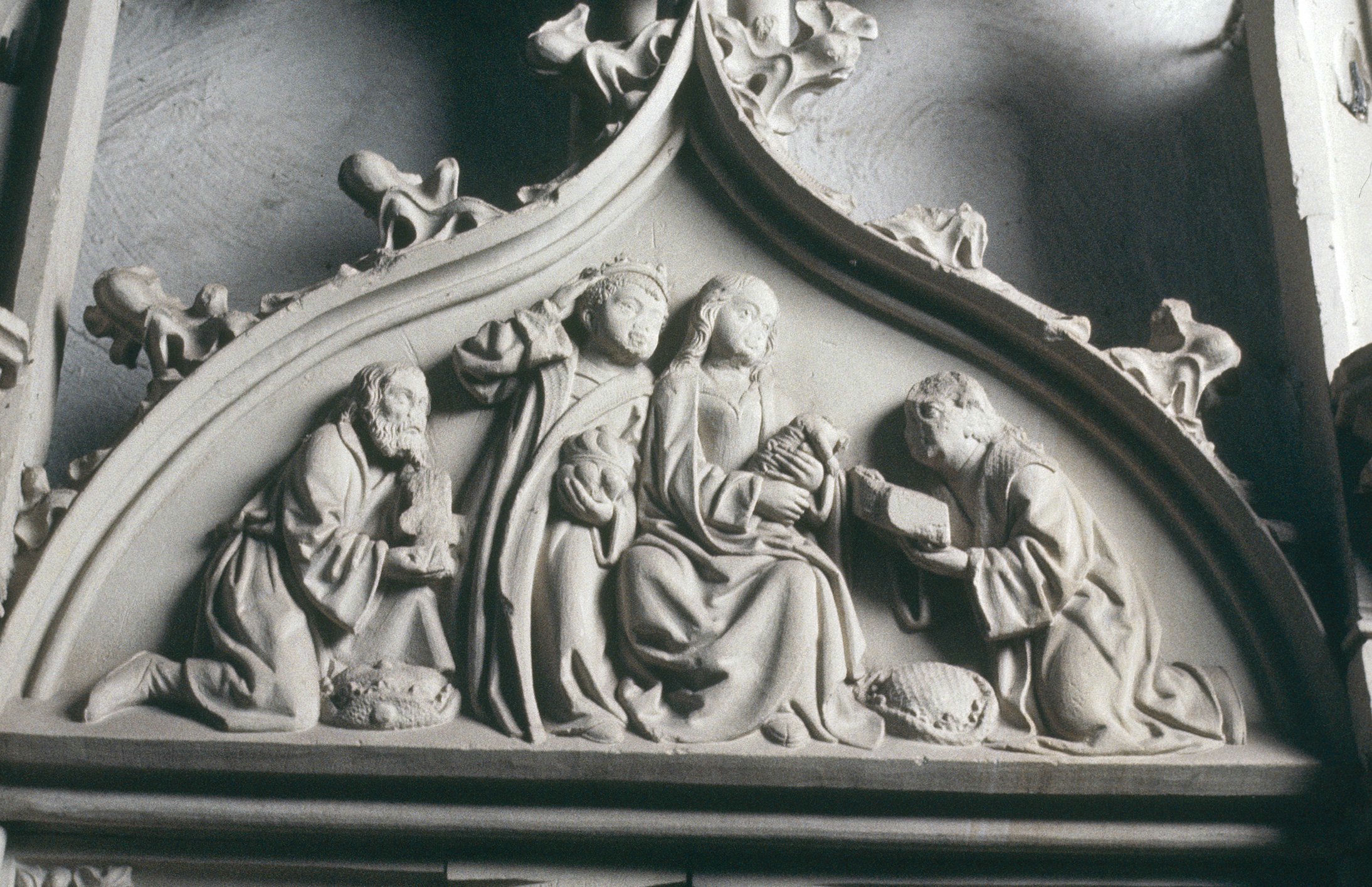 Kloostercomplex: INTERIEUR, GEDEELTE VAN HET PRIESTERGESTOELTE